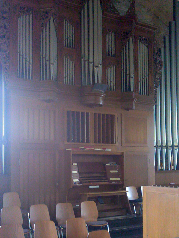 Marktkirche in Essen-Kettwig, Kanzel und Interieur